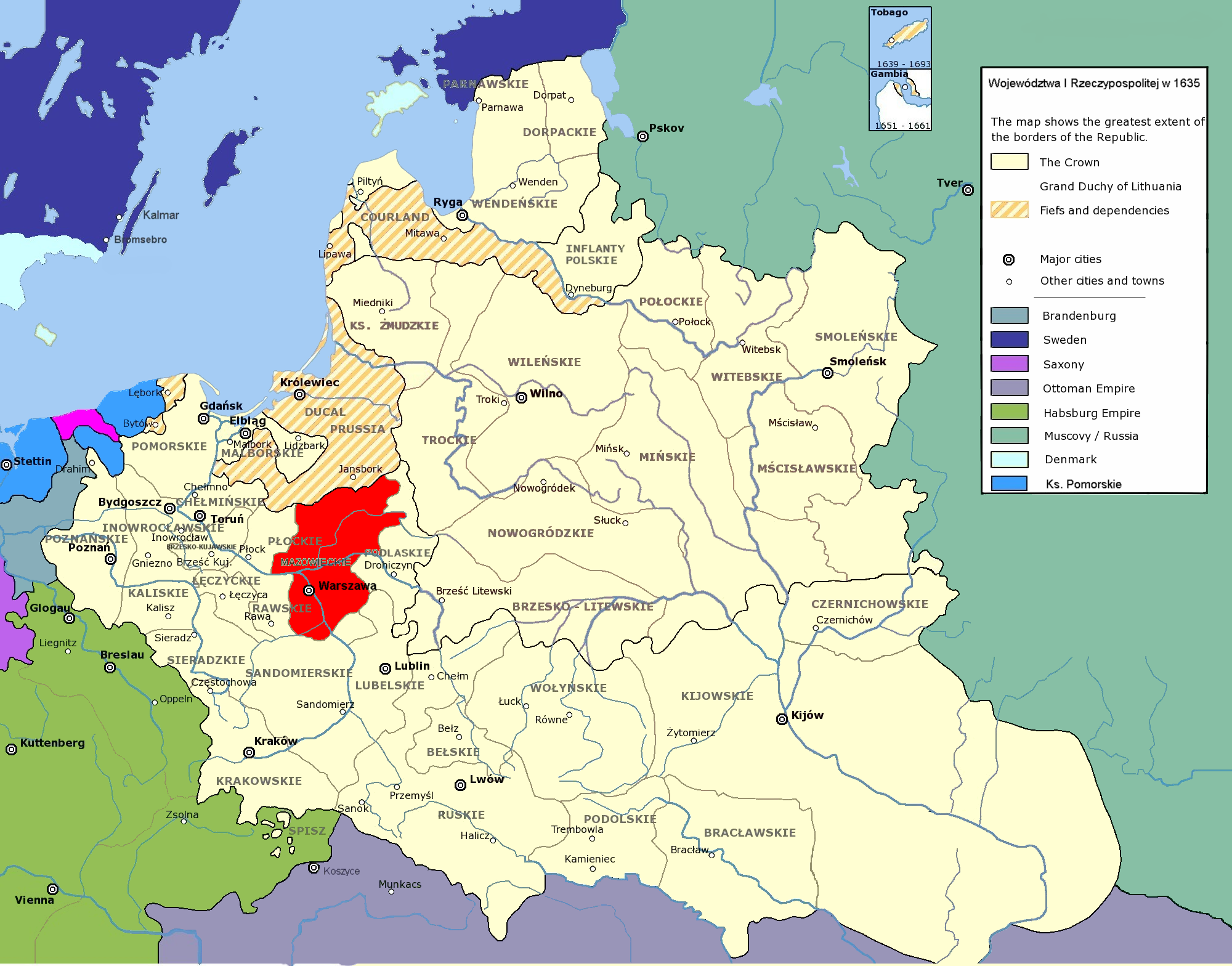 Województwo Mazowieckie w 1635 author user:Halibutt and user:Mathiasrex